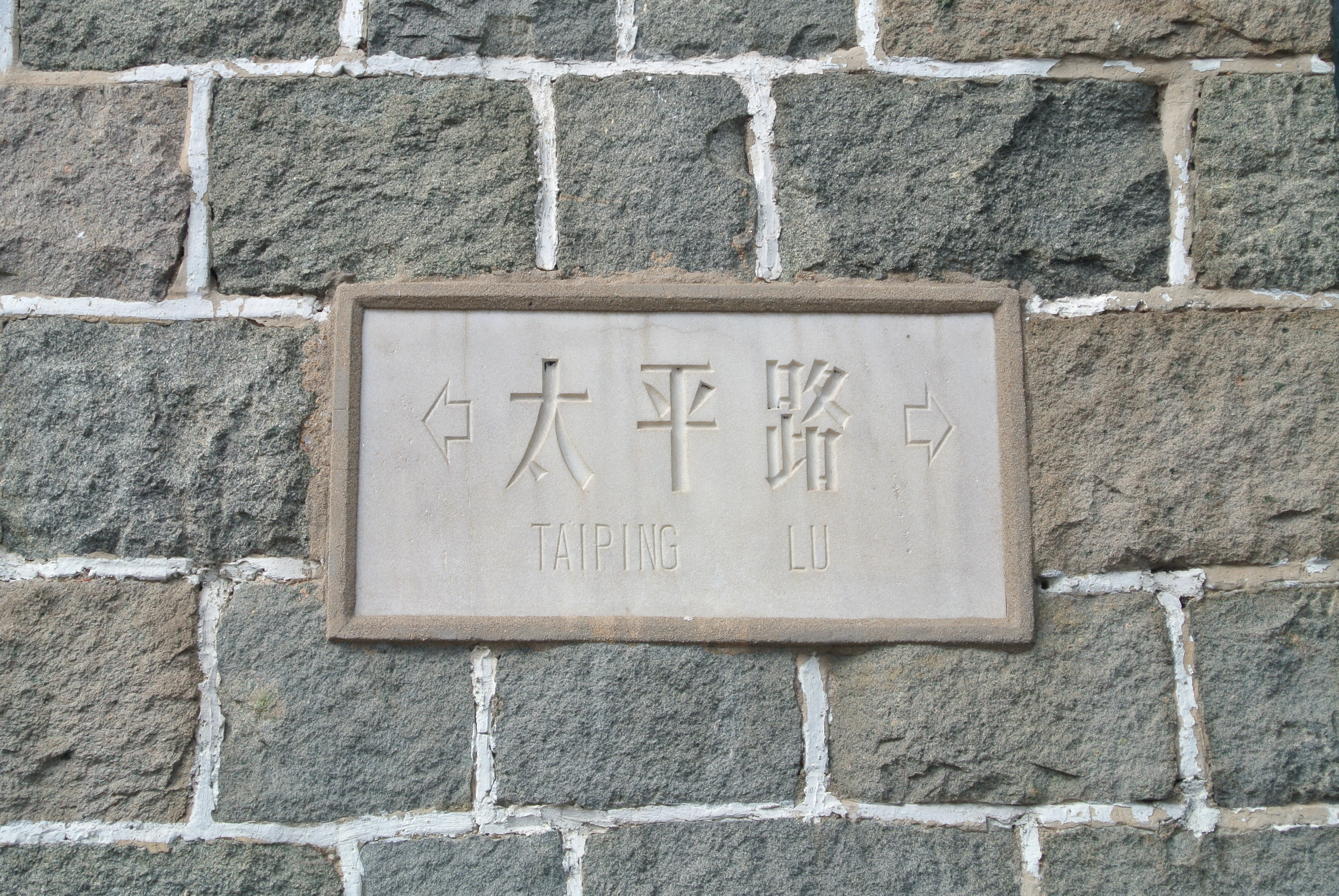 青岛太平路老路牌